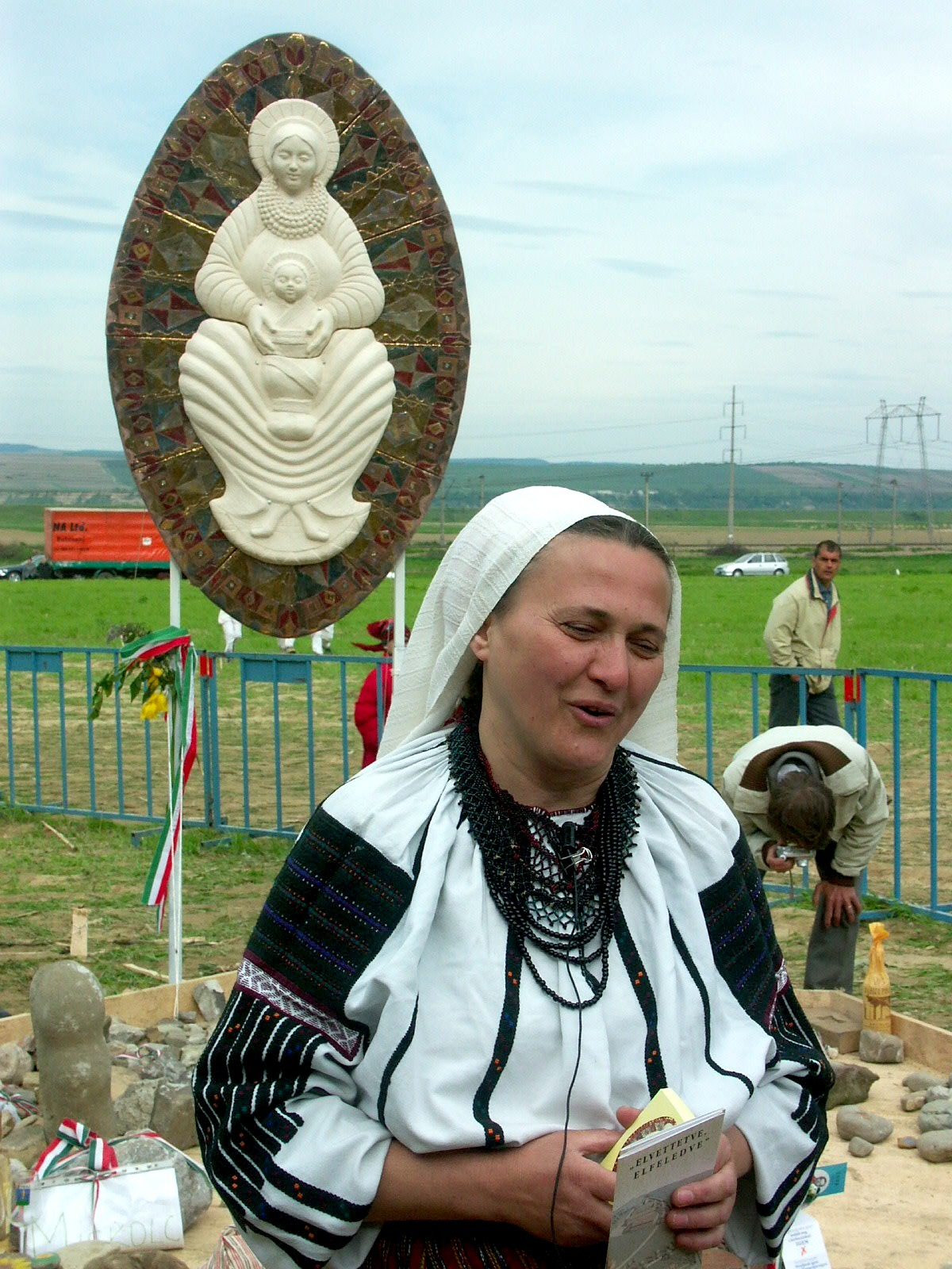 Petrás Mária a Béke Királynője Moldvai Csángó Iskolaközpont alapkőletételén. A háttérben az erre az alkalomra saját maga által készített és ajándékozott Mária kerámia dombormű, 2005 pünkösdjén. Rekecsin, Moldva.